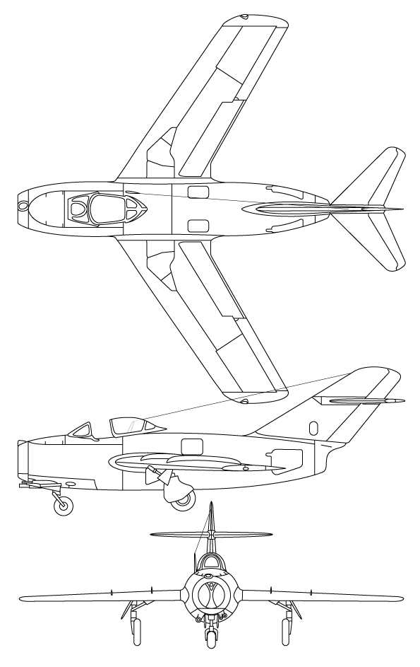 MiG-15 3-view_drawing